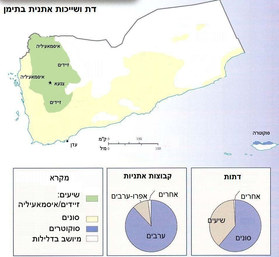 חלוקה אתנית ודתית בתימן